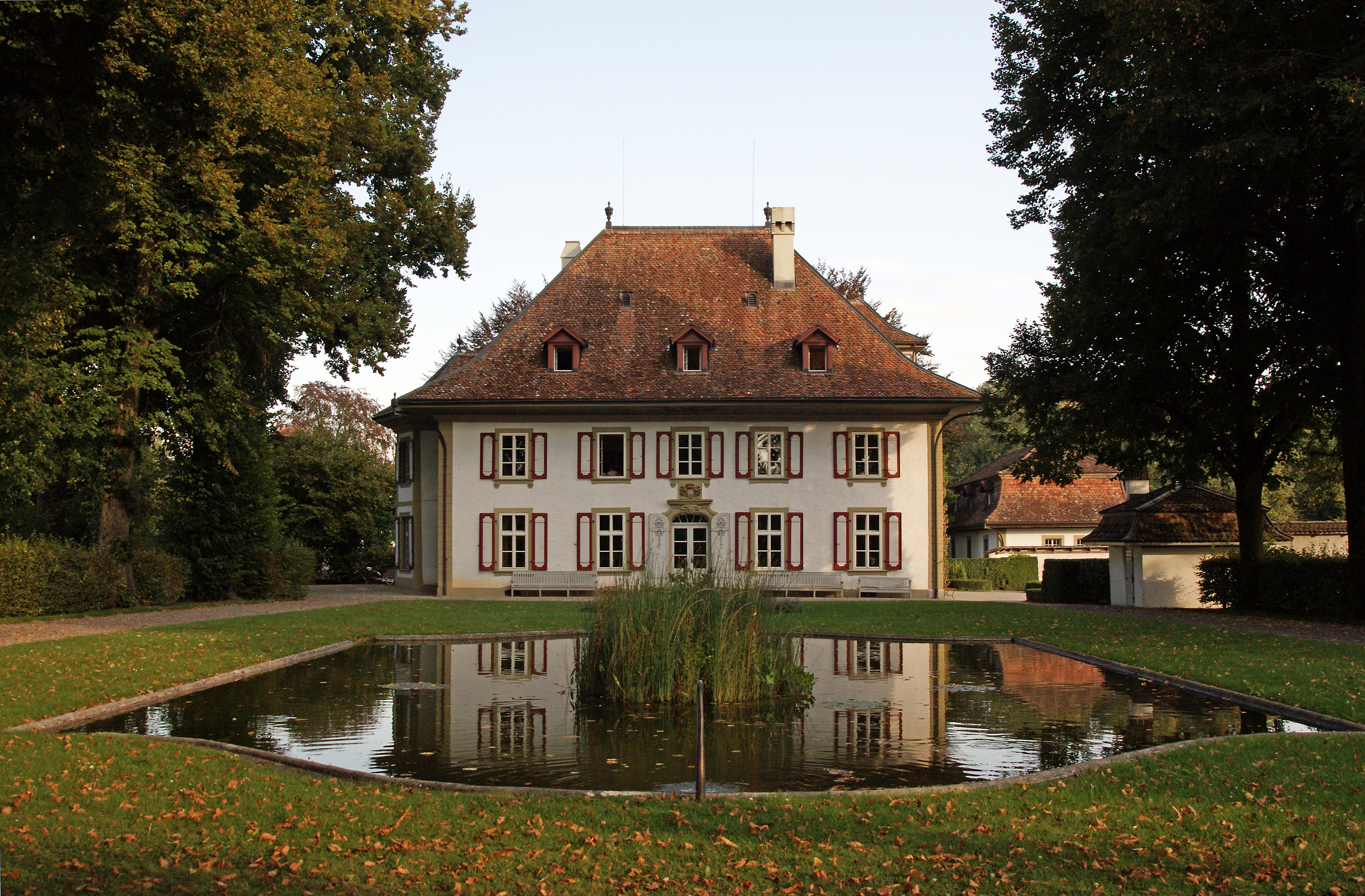 Landsitz Bellerive, Thun, von der Parkseite her (dient heute der Musikschule Region Thun)